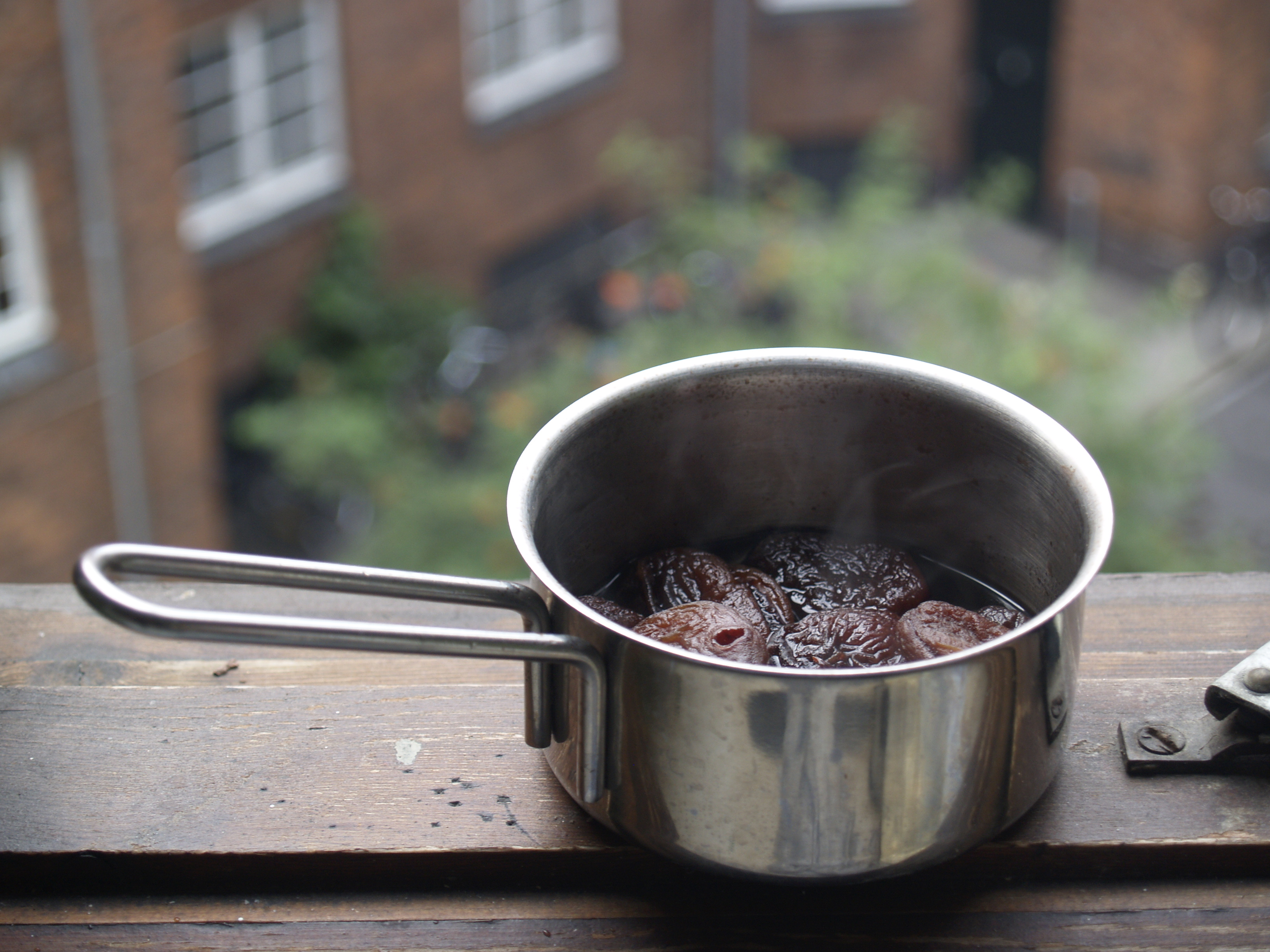 Rødvinssyltede abrikoser